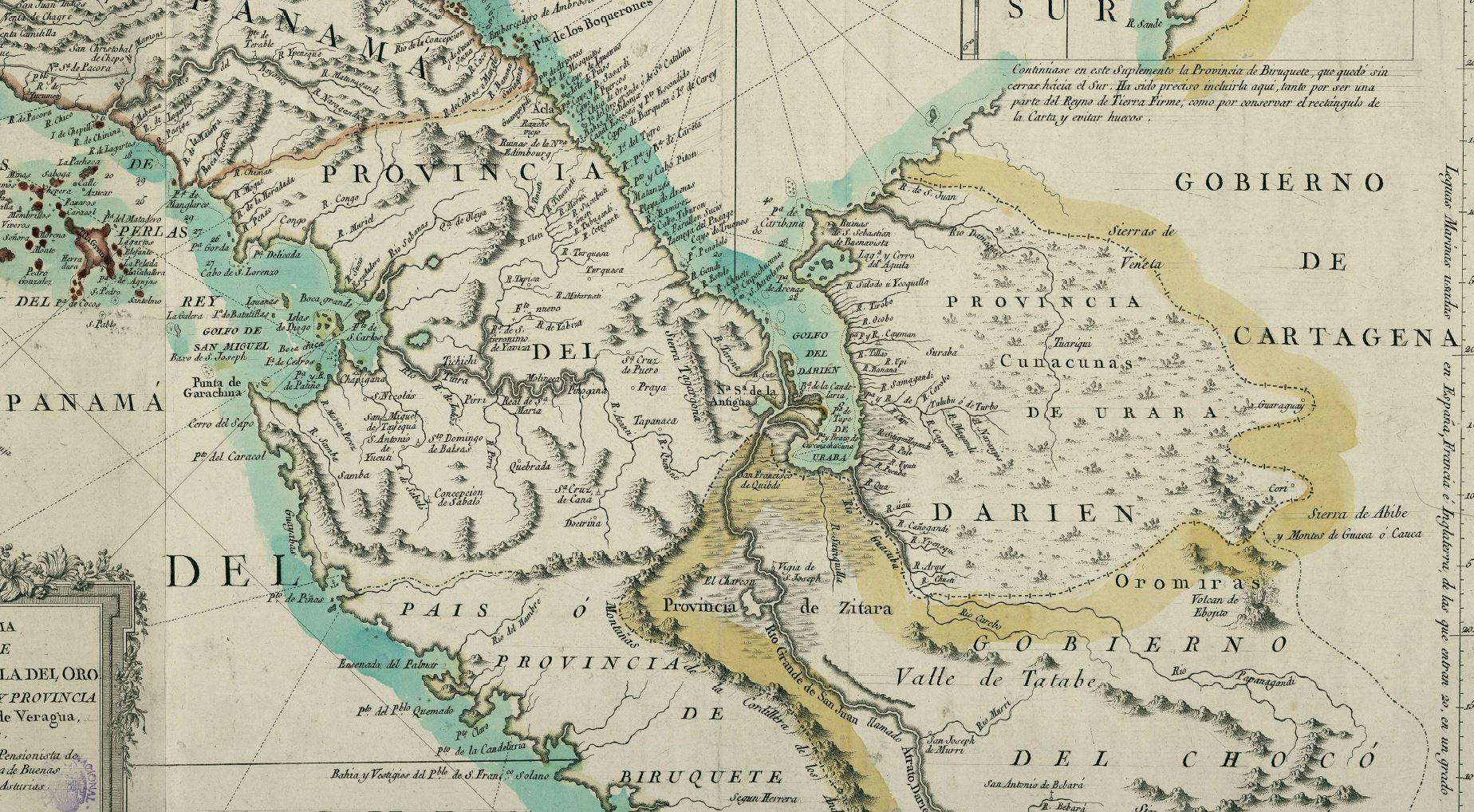 Título original: Carta Maritima del Reyno de Tierra Firme ú Castilla del Oro : Comprehende el Istmo y Provincia de Panamá, las Provincias de Veragua, Darien y Biruquete Mapa de Tierra Firme (actualmente el territorio de Panamá y parte de sus vecinos Costa Rica y Colombia) realizado en 1785 por Juan López, "Geógrafo Pensionista de S.M., Individuo de la Real Academia de Buenas Letras de Sevilla y de la Sociedad de Asturias". El autor cita entre sus fuentes a dos mapas "de punto menor" de Jean-Baptiste d'Anville, la crónica de Antonio de Herrera, una medida de longitud de Jorge Juan y varios mapas de Bellin, Jefferis, José Antonio de Pineda, Antonio de Arévalo y Bernardo Iriarte.